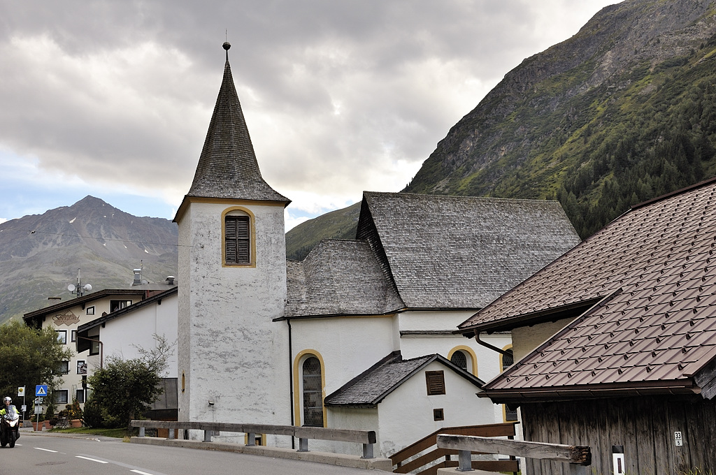 Kath. Pfarrkirche Mariahilf und Friedhof in Plangeross